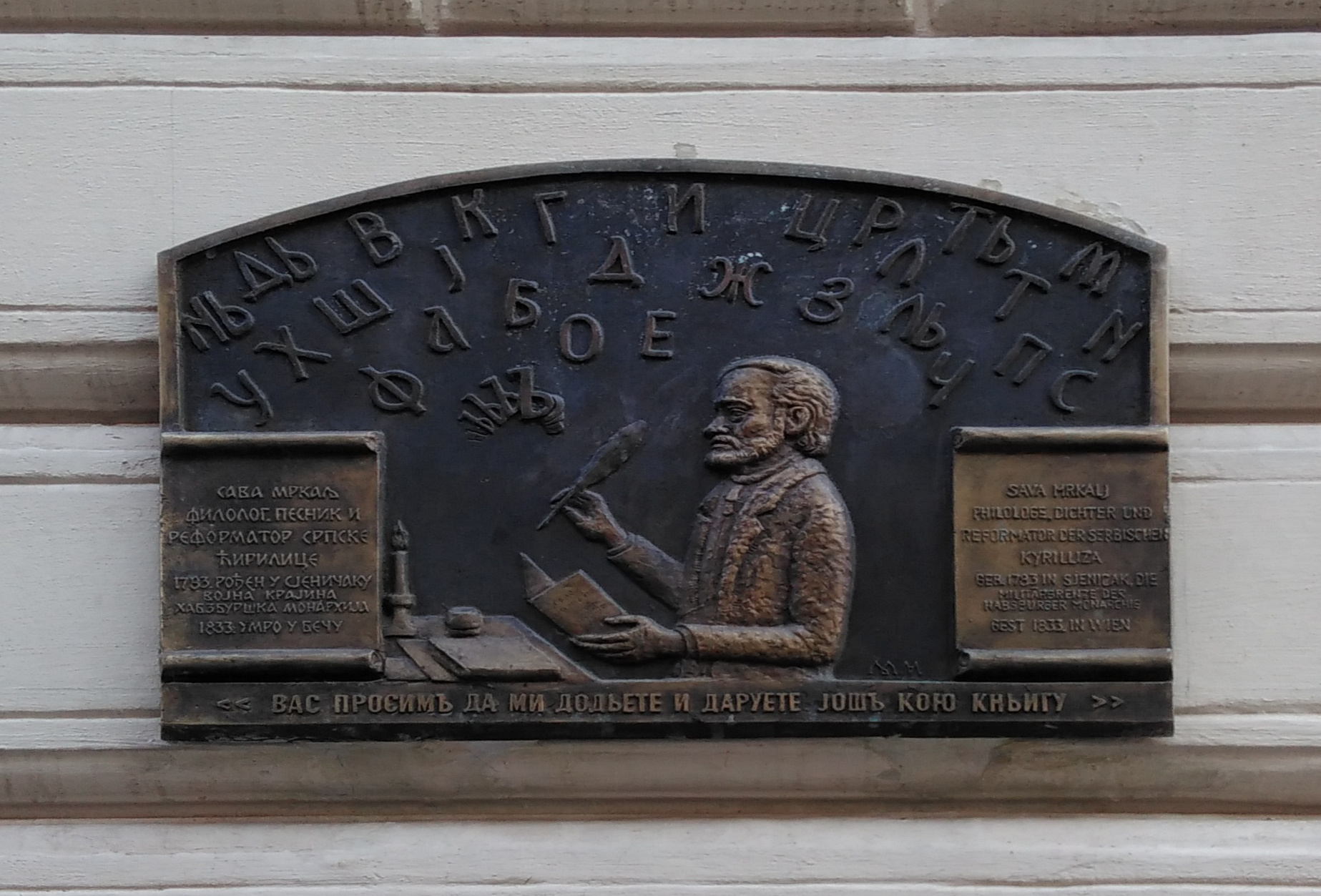 Gedenktafel Sava Mrkalj 1030 Wien Veithgasse 3